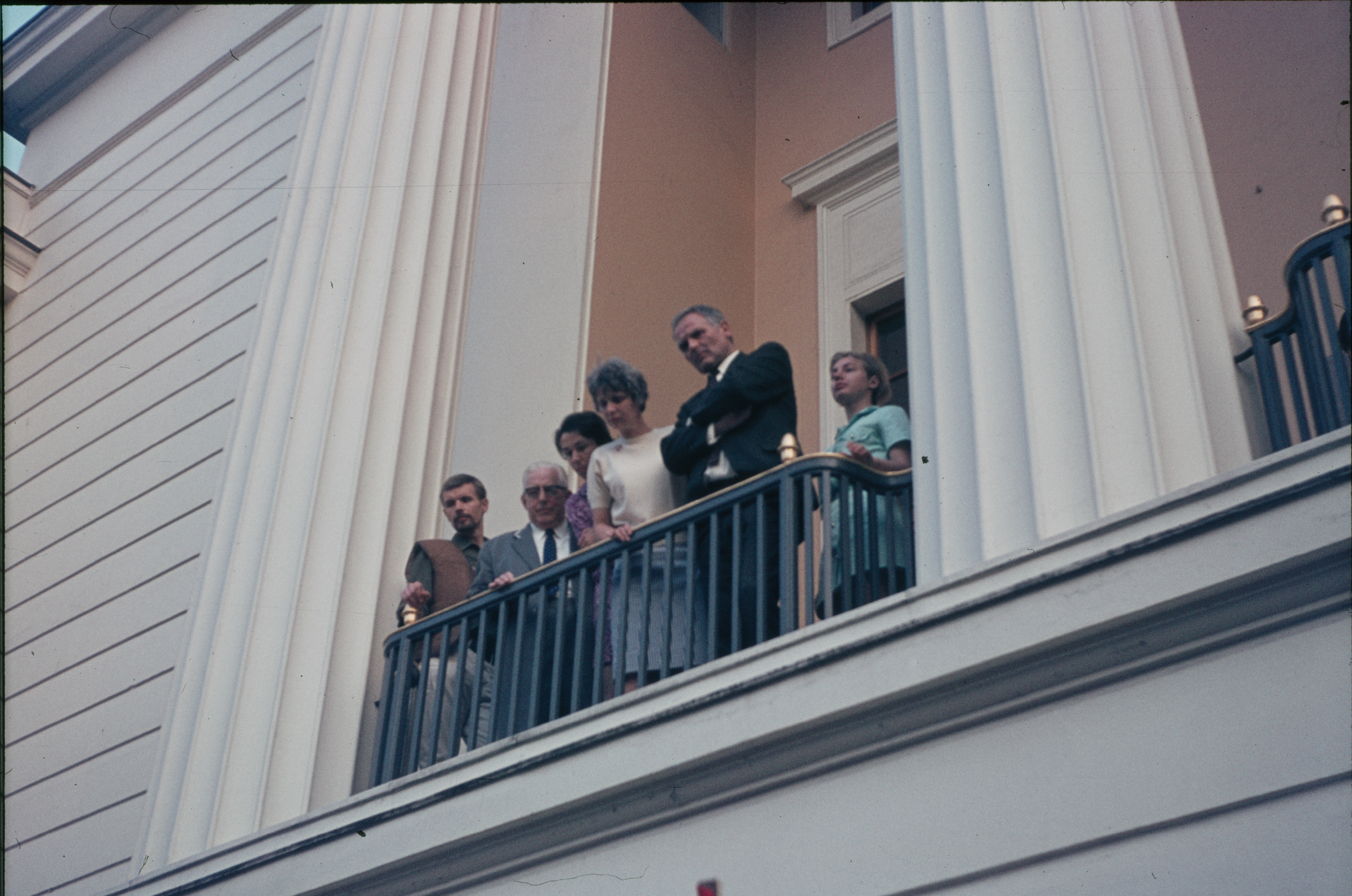 Kurt Hübner auf dem Balkon des Theater am Goetheplatz, unter läuft die Demonstration gegen die Notstandsgesetze